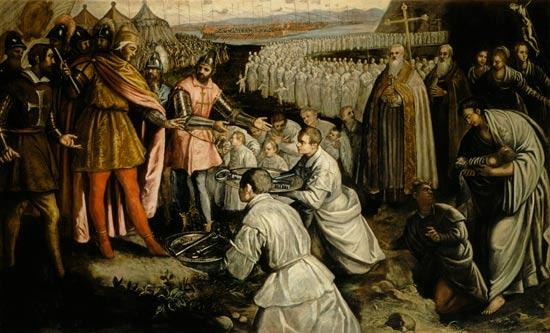 D. Tintoretto.